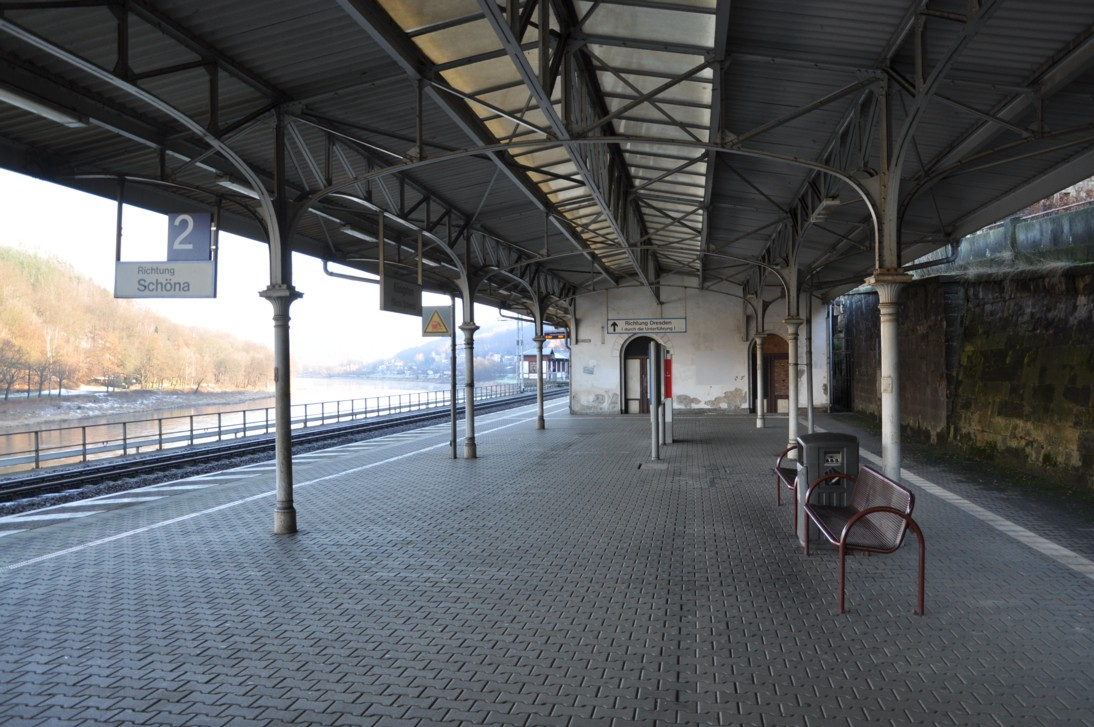 Haltepunkt Königstein (Sächs Schweiz), Bahnsteig